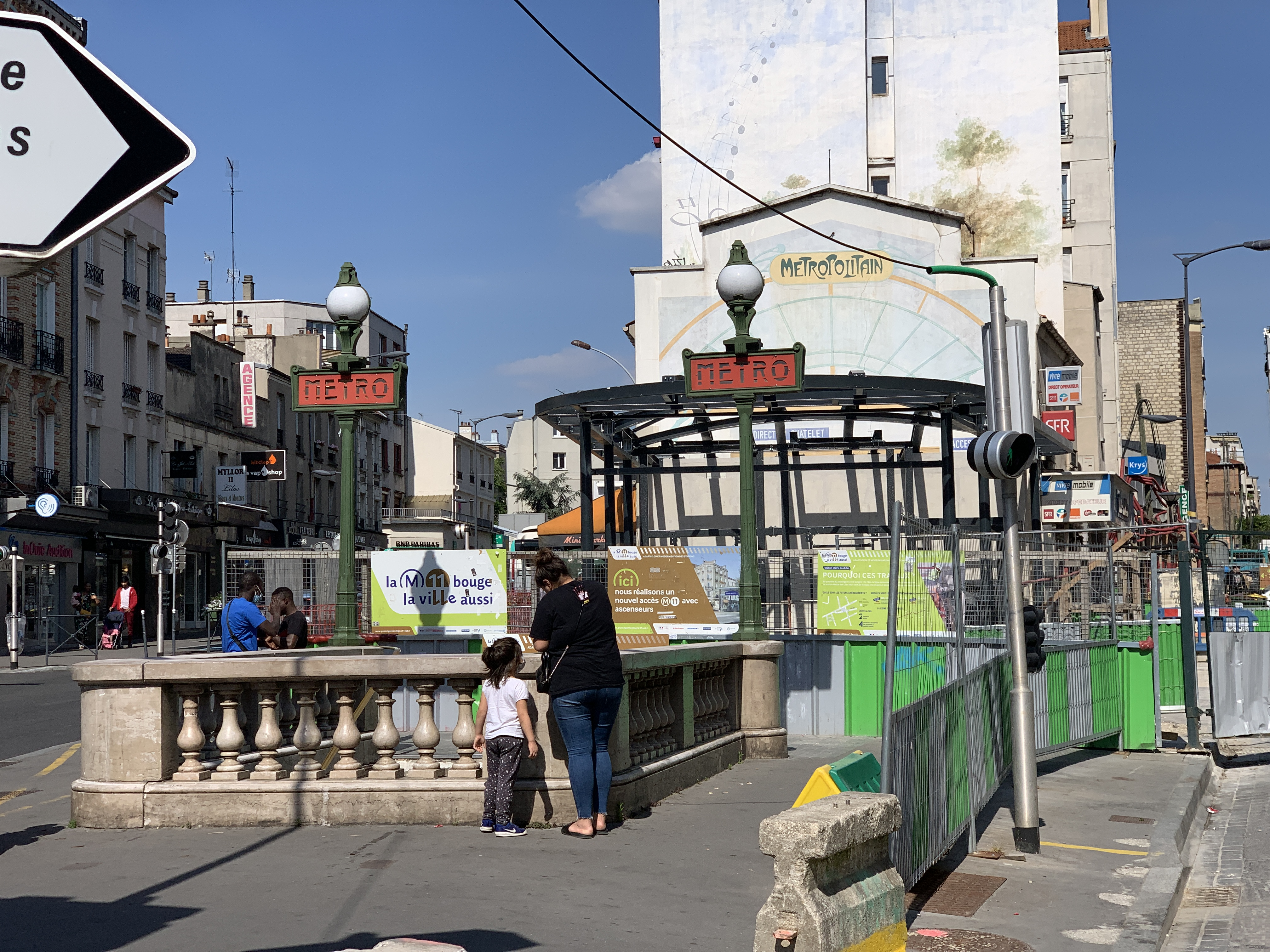 Chantier de la station de métro Mairie des Lilas, Les Lilas.